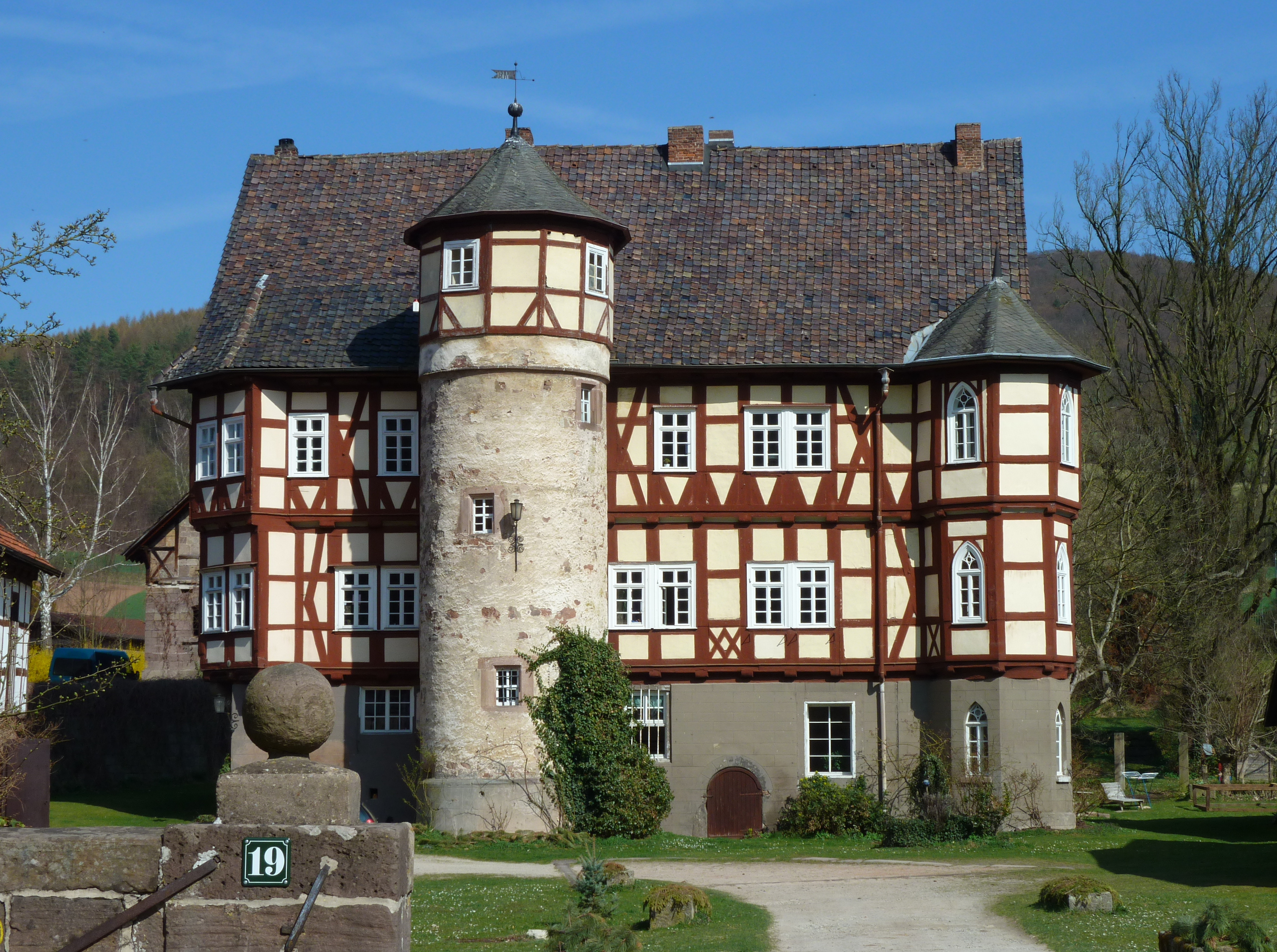 Gutshof in Werleshausen, Stadt Witzenhausen, Nordhessen. Keller und massives Sockelgeschoss erbaut um 1280, Obergeschosse 1556 nach Brand als Renaissance-Fachwerk neu aufgebaut.